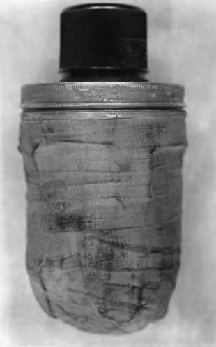 Запасная граната Кубиша, найденная на месте покушения на Гейдриха 27 мая 1942 года